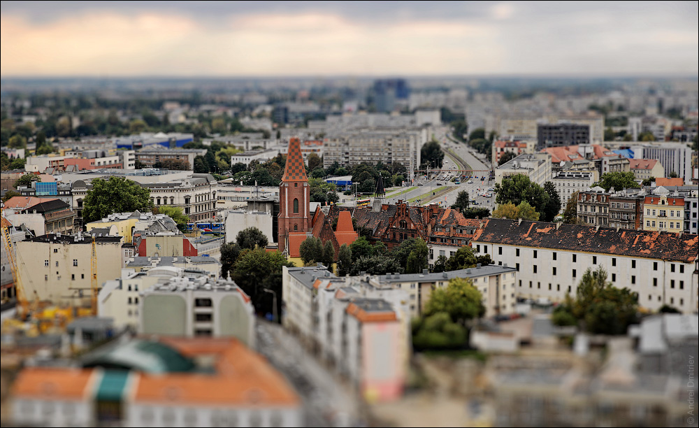 Уроцлаўскія замалёўкі